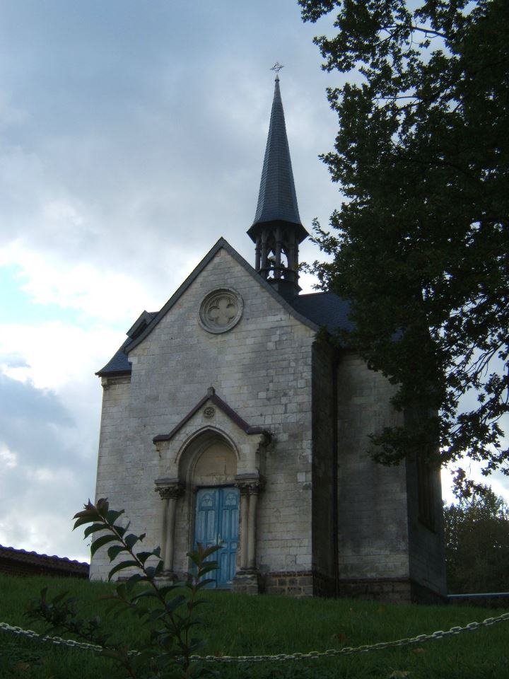 Chapelle funéraire des Hauteclocque de Wail